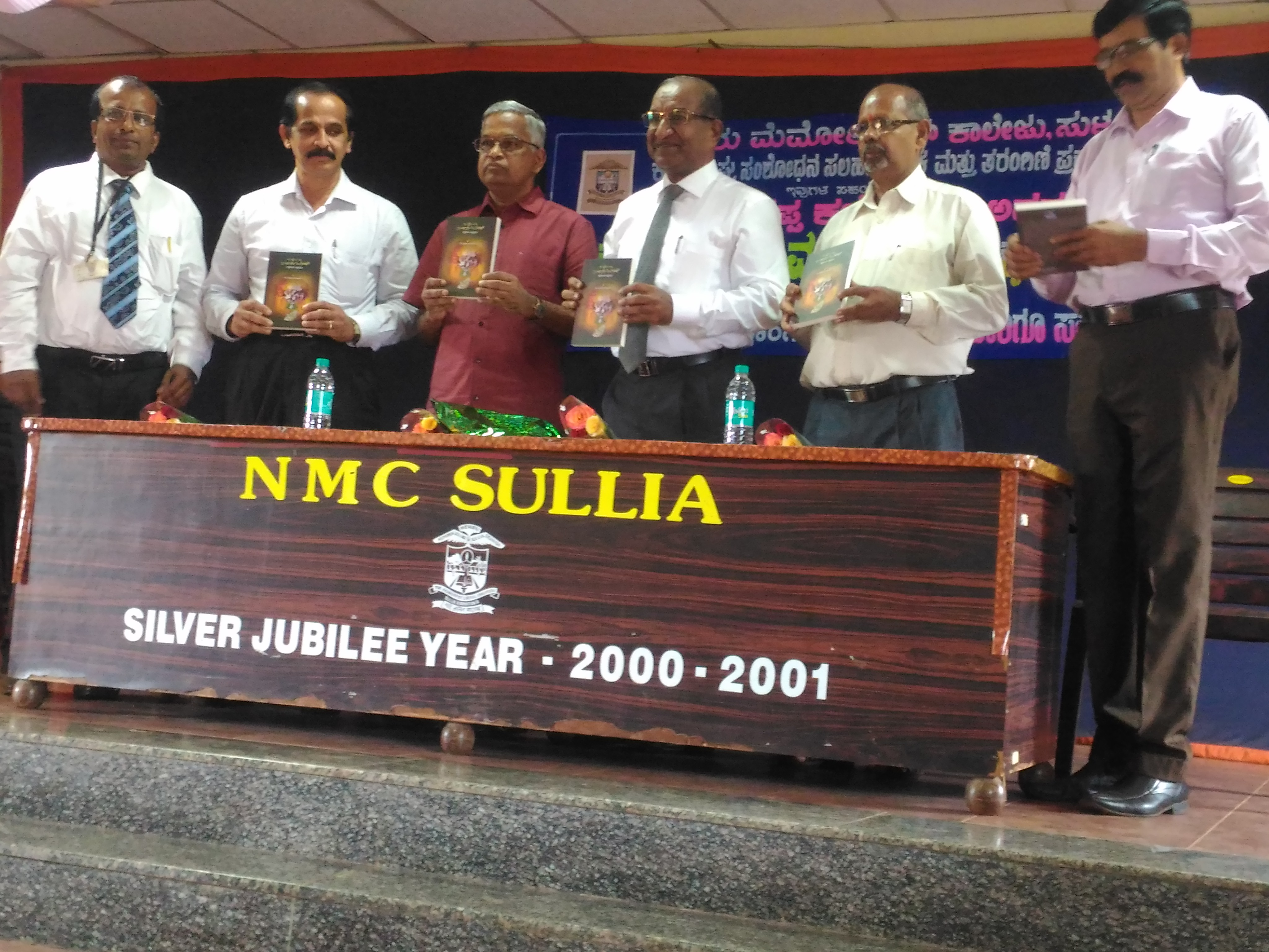 ಕನ್ನಡ: ಪುಸ್ತಕ ಬಿಡುಗಡೆ